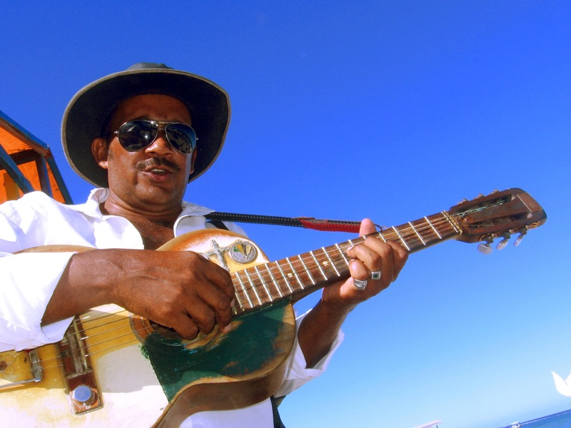 Repentista, músico do folclore brasileiro